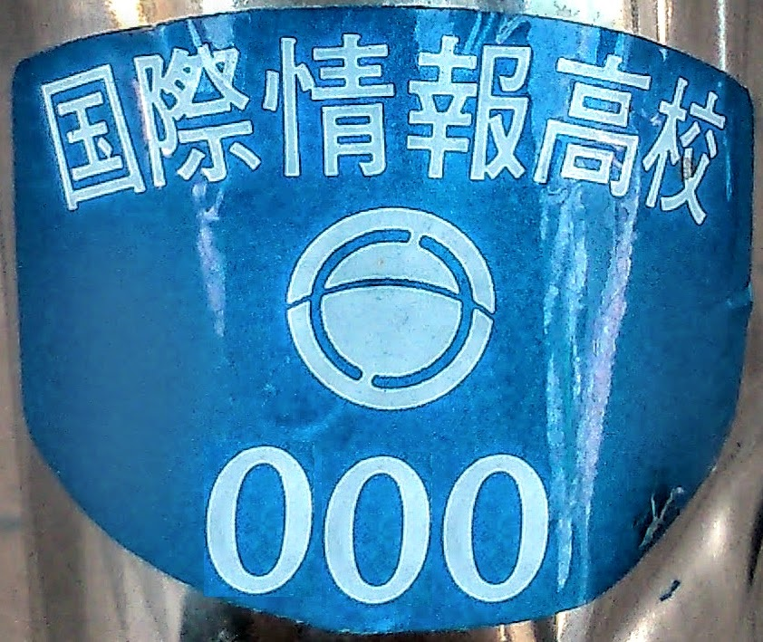 国際情報高等学校・通学用自転車ステッカー